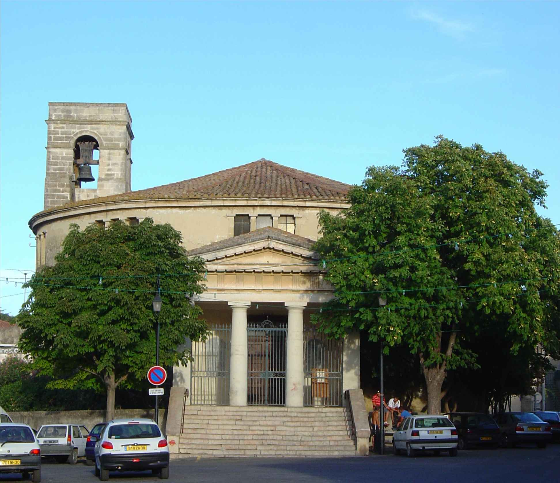 Beauvoisin Le Temple 2006 Auteur : R. BENEZET